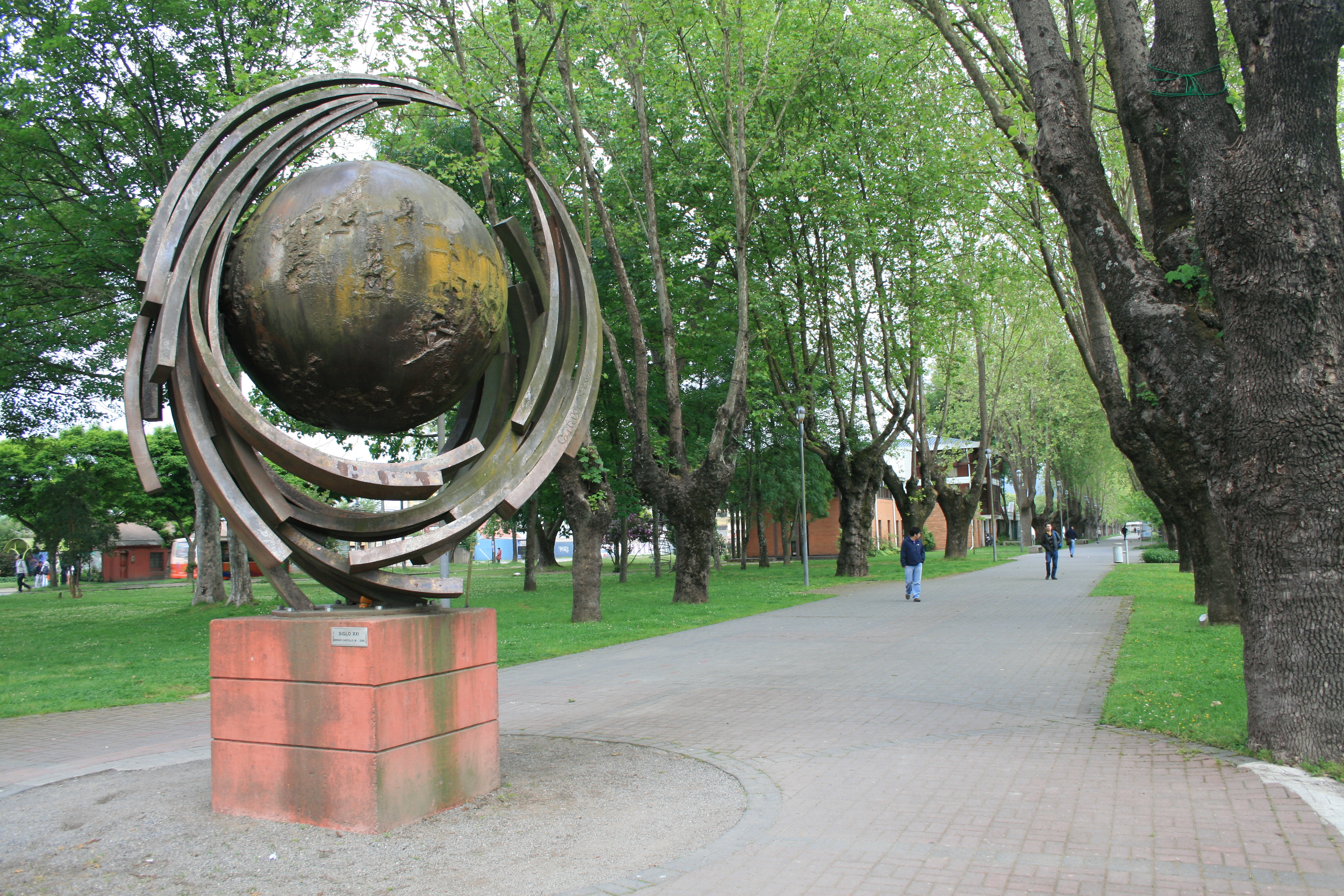 Escultura ubicada en la Universidad del Bío-Bío en la ciudad de Concepción, Chile.